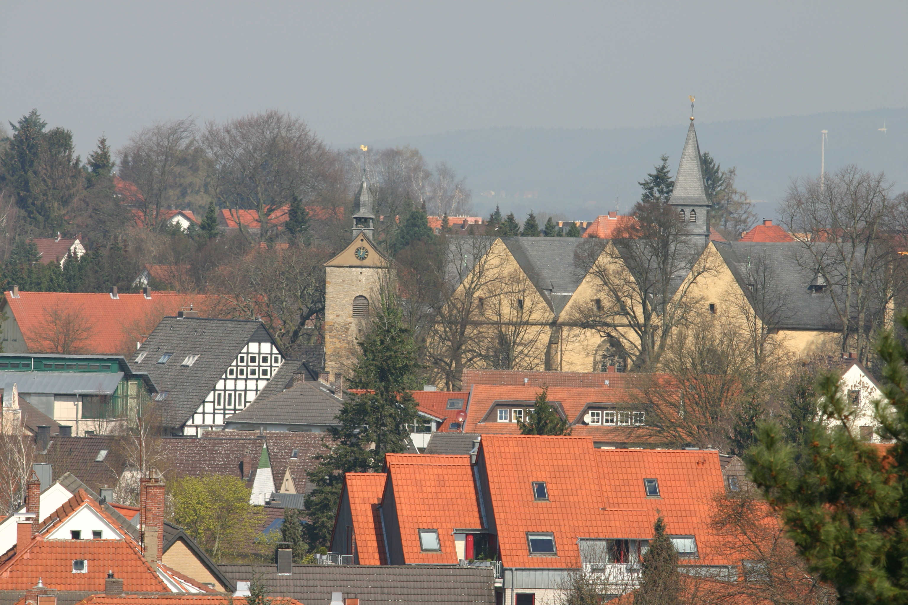 Blick über Enger mit der Stiftskirche. Fotografiert vom Liesberg.